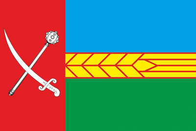 Прапор Горохівського район